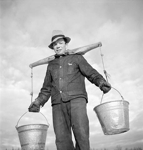 L'homme à tout faire Andres Budge, de Maniwaki, transportant de l'eau dans des seaux au moyen d'un joug posé sur ses épaules au camp de bûcherons de M. Kearney, dans la région de l'Outaouais, par une journée d'hiver en 1943.